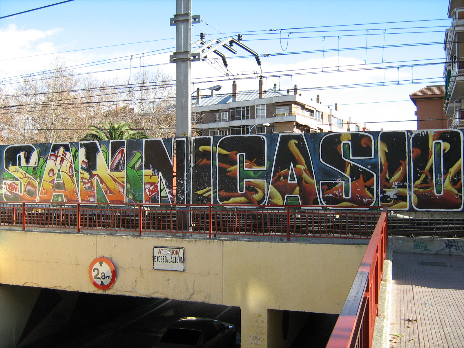 Mural en la tapia que delimita la vía del ferrocarril de cercanías C-5, en la salida del barrio de San Nicasio, Leganés (Comunidad de Madrid).